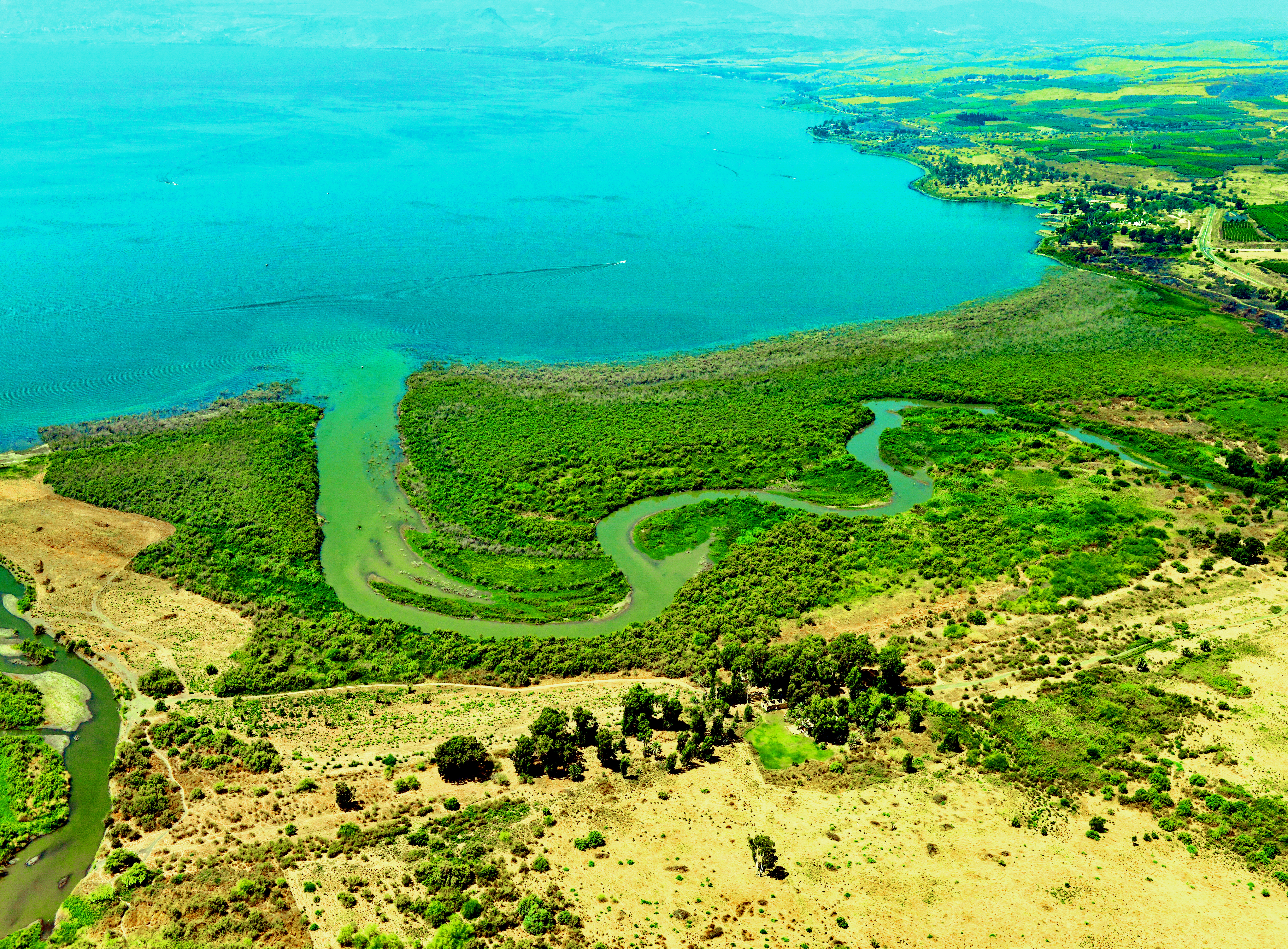 קבוצה של 16 משפחות איכרים יהודיים מחצי האי קרים שבאוקראינה התיישבה במקום כאריסיו של עבדול רחמן פאשה אל יוסוף, בעל אדמות בטיחה